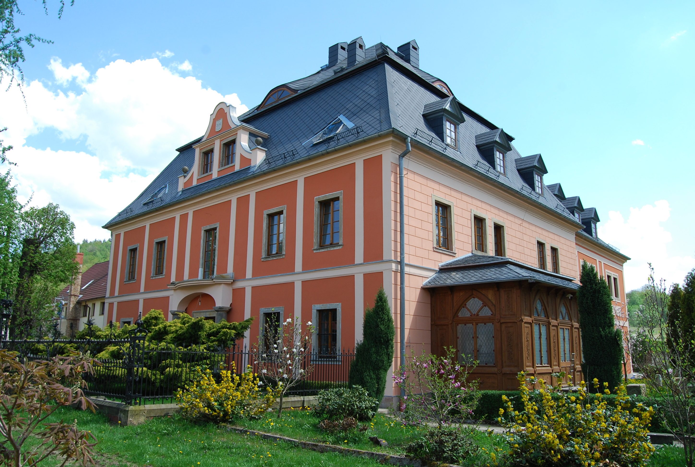 Wleń, ul. Winiogórska 1 - pałac, XVI, XIX